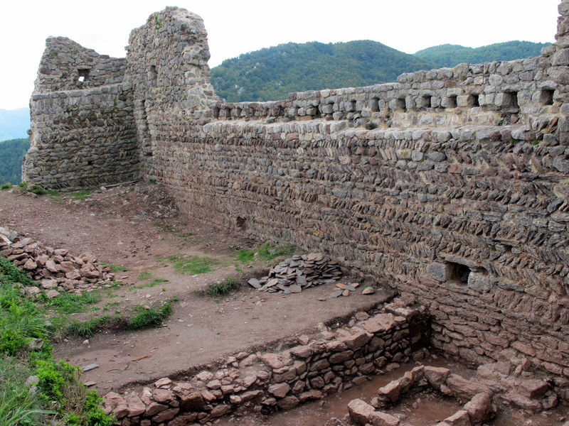 castell de Rocabruna - Camprodon a la comarca del Ripollès - Catalunya